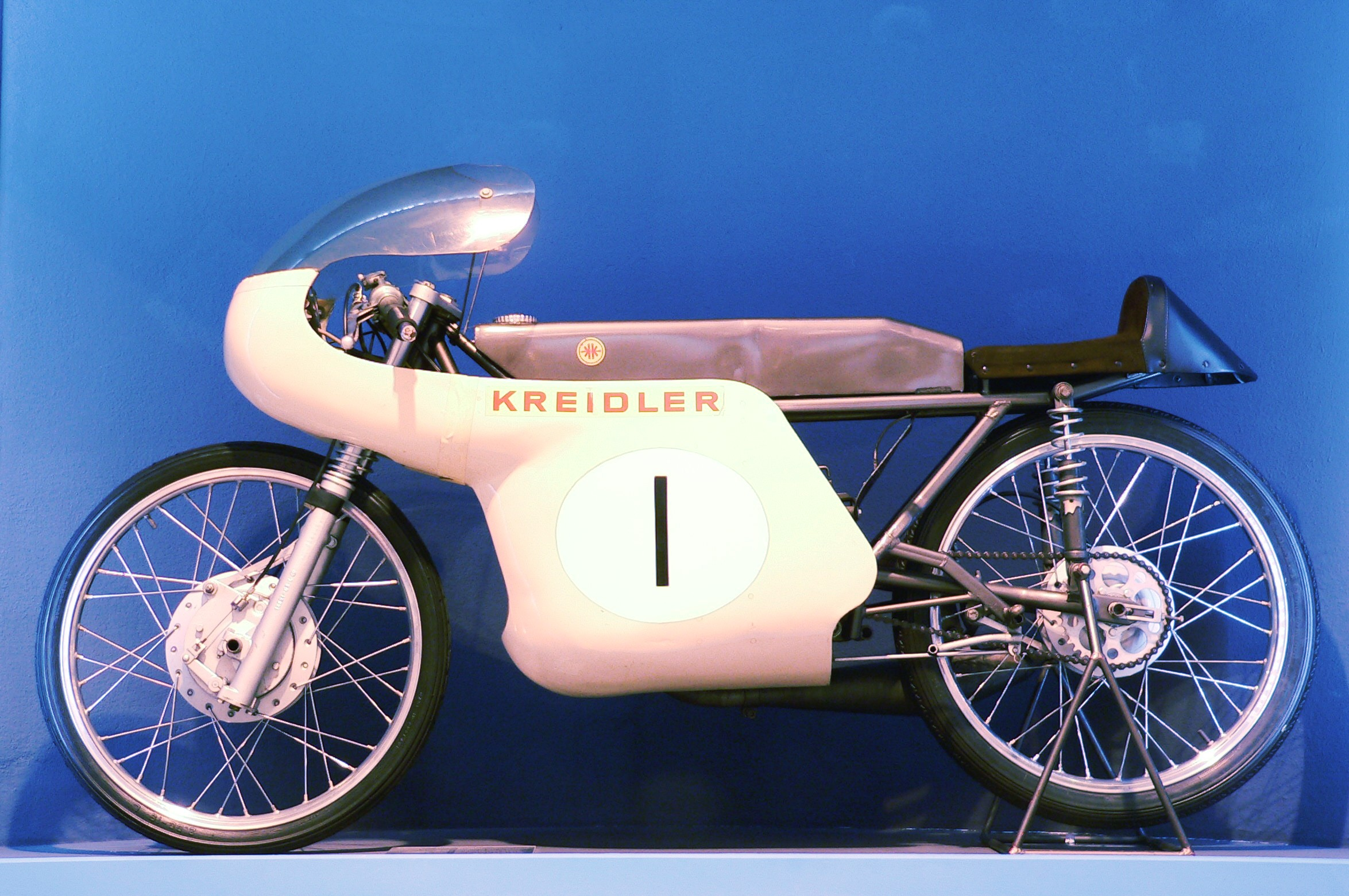 Motorbike "Kreidler Renn-Florett" (1963) at the Deutsches Zweirad- und NSU-Museum (50 cm³, 14 PS bei 15.000 U/min., 170 km/h)